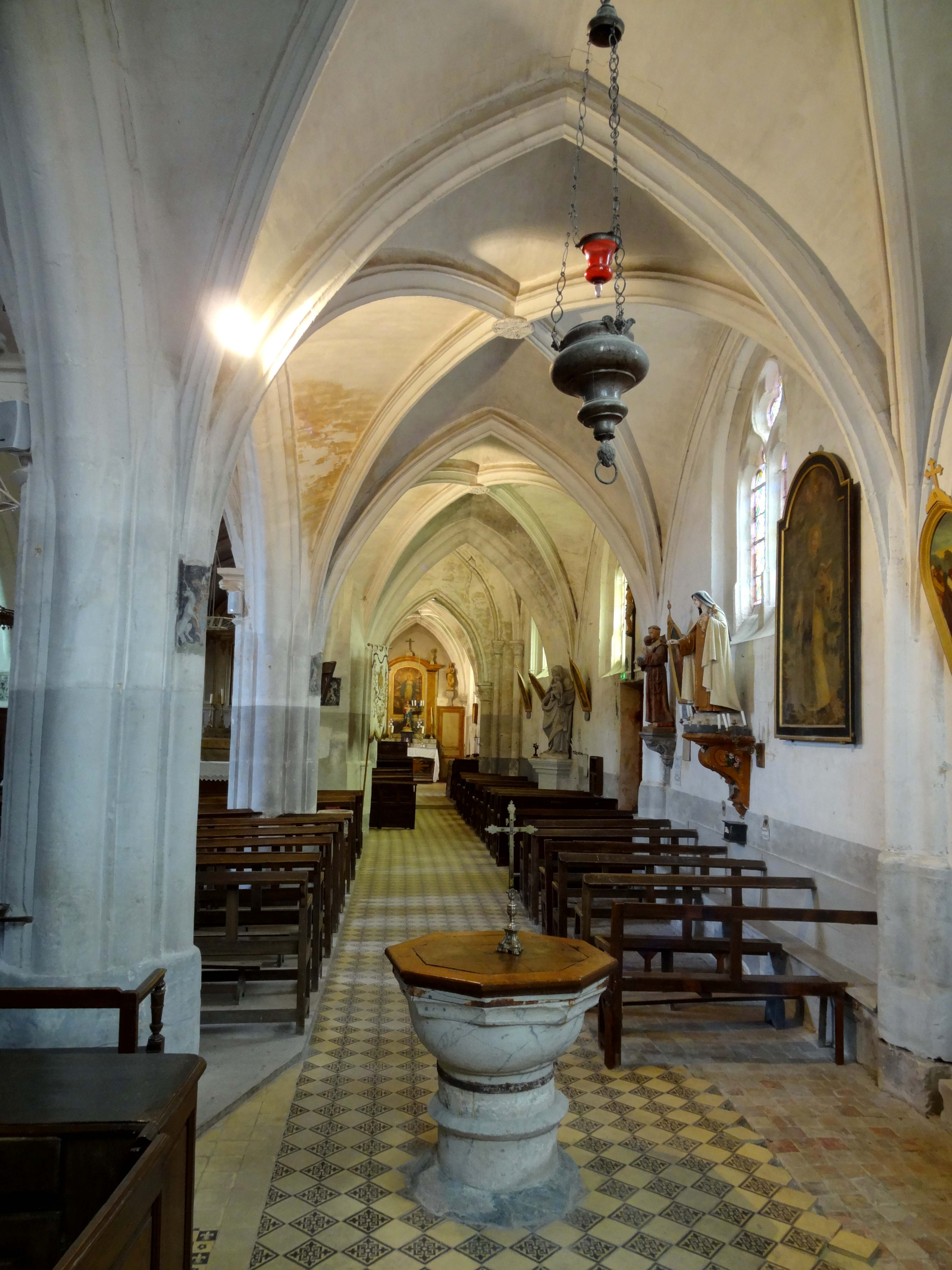 Intérieur de l'église - voir titre.